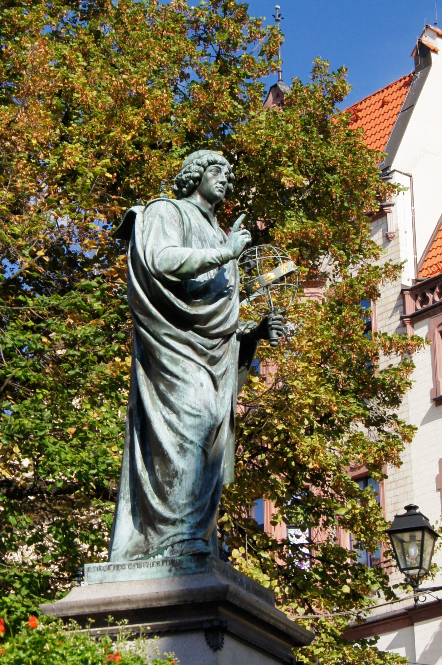 Toruń - Pomnik Mikołaja Kopernika w zespole Rynku Staromiejskiego